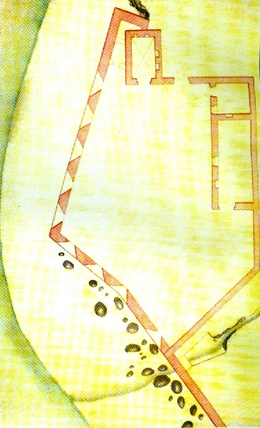 Forte da Casa de Santa Catarina (das Mós). MACHADO, Francisco Xavier. "Revista dos Fortes e Redutos da Ilha Terceira" (1772). in MARTINS, José Salgado, "Património Edificado da Ilha Terceira: o Passado e o Presente". Separata da "Atlântida", vol. LII, 2007. p. 34.